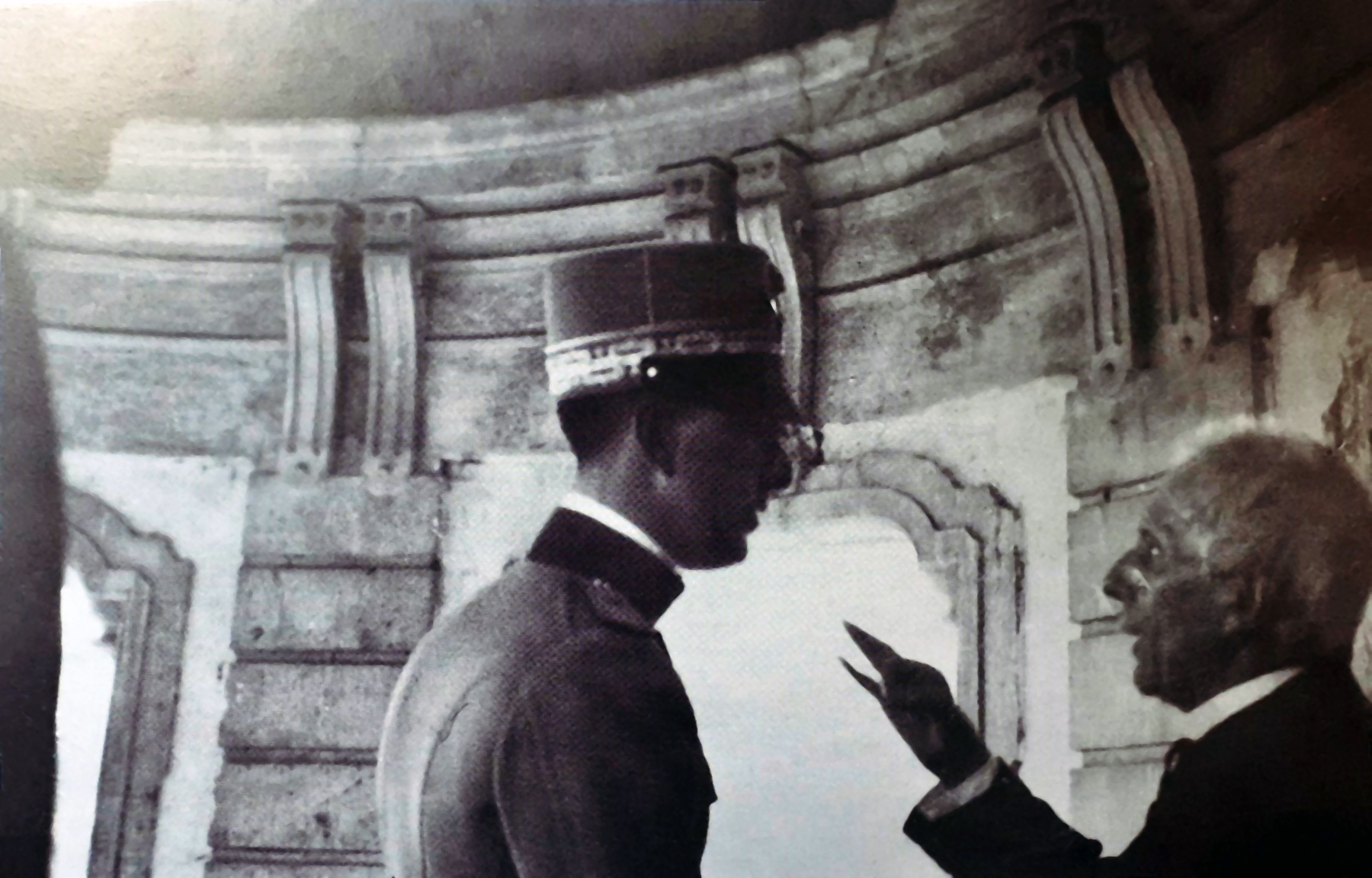 Umberto II di Savoia e don Arcangelo Rotunno nella Certosa di San lorenzo, Pdula (SA) IT, 1932.